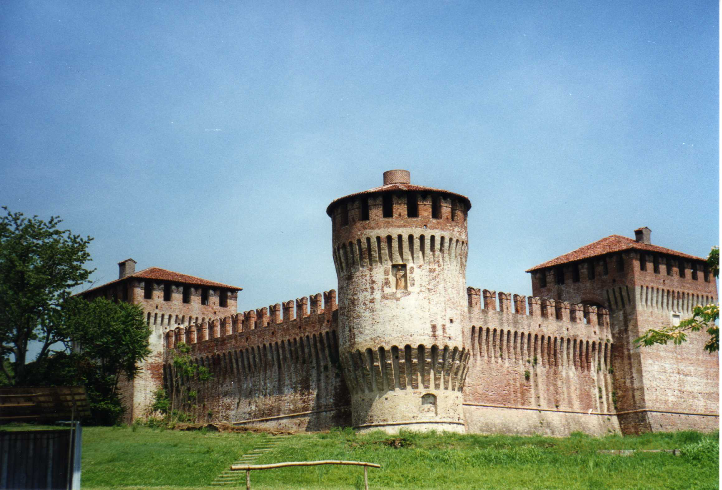 Author Giorces. Soncino - Castello visconteo, lato Sud.